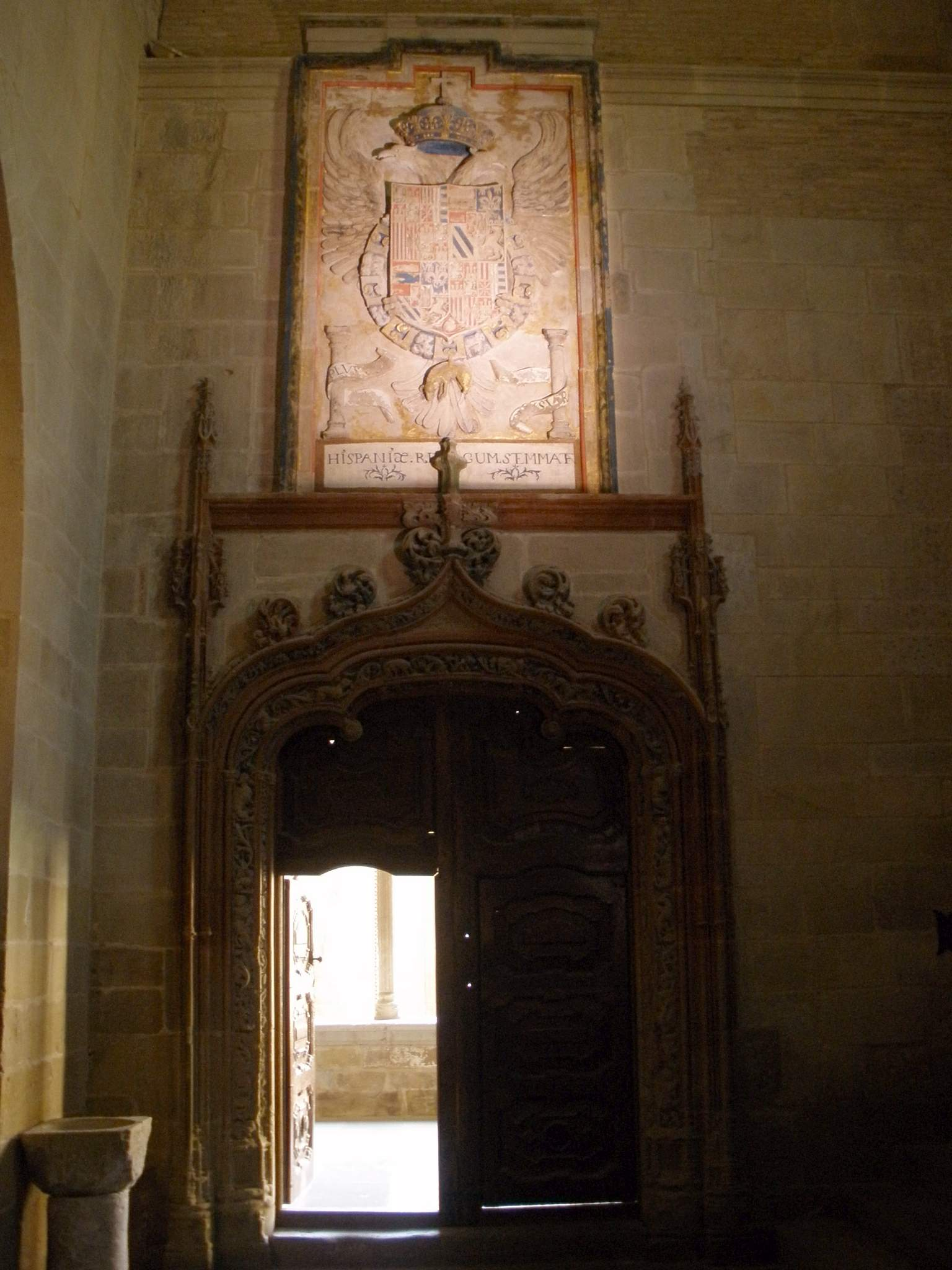 Monasterio de Santa María la Real (Nájera, La Rioja)